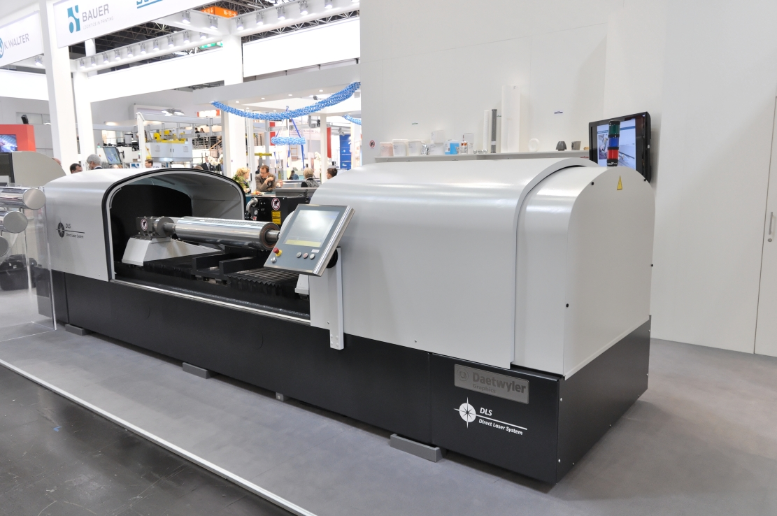 Bilder von der Drupa 2012 Drupa 2012